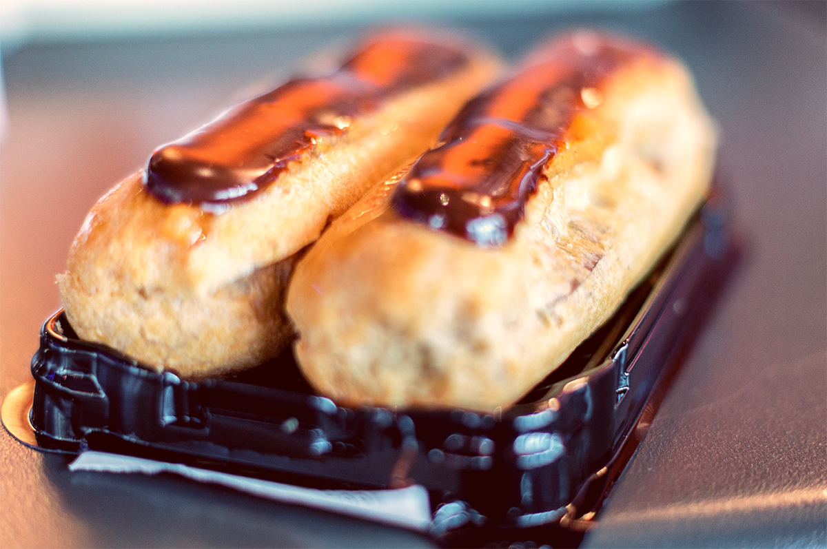 Classic dessert...